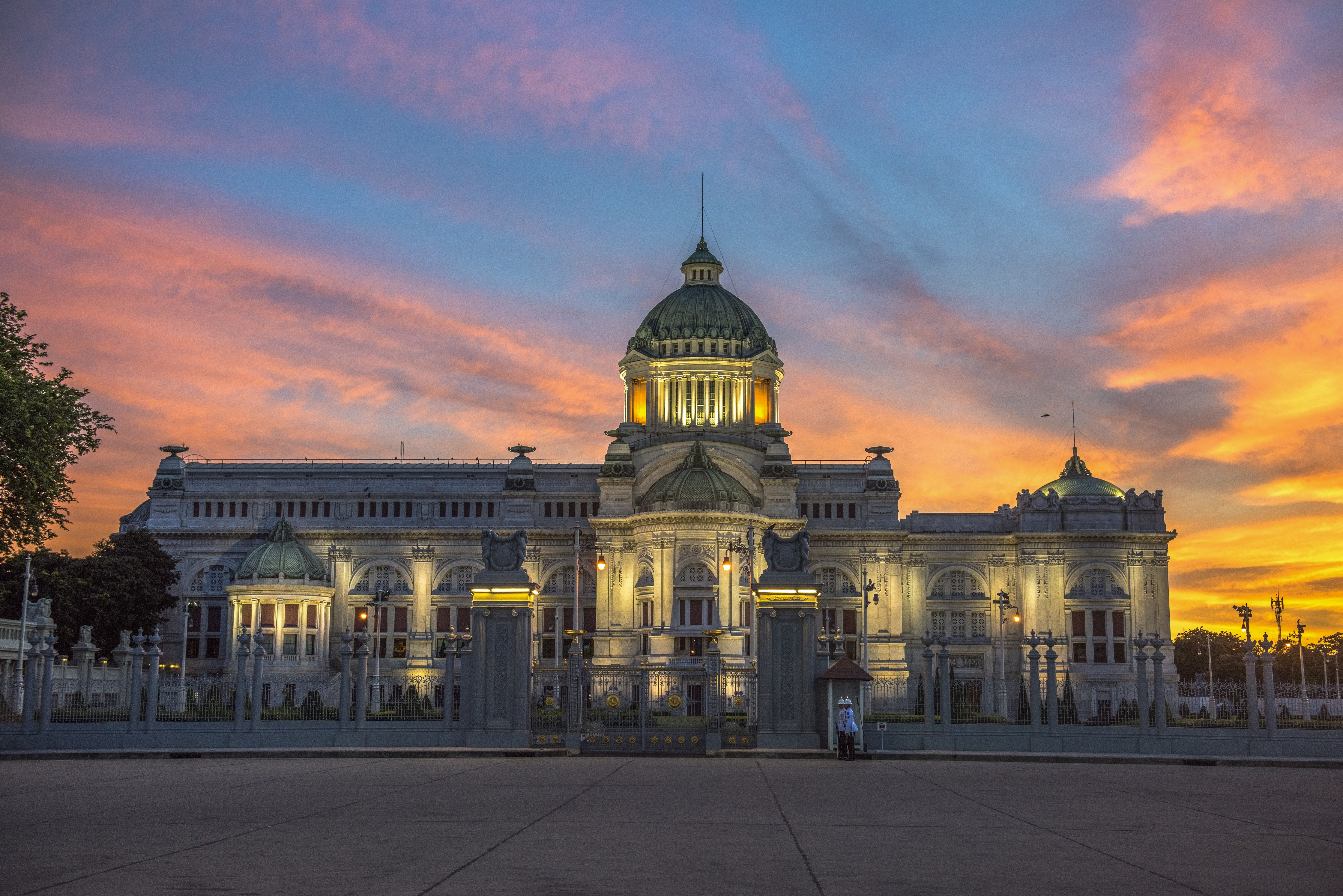 แสงเช้าในวันที่ 12 สิงหาคม 2560 เป็นวันแม่แห่งชาติ